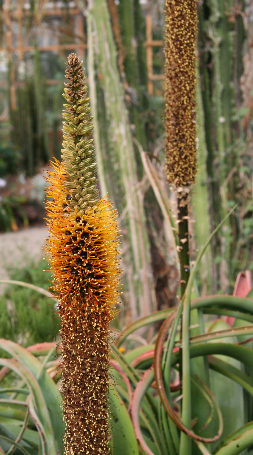 Aloe sessilifora im Botanischen Garten Dresden